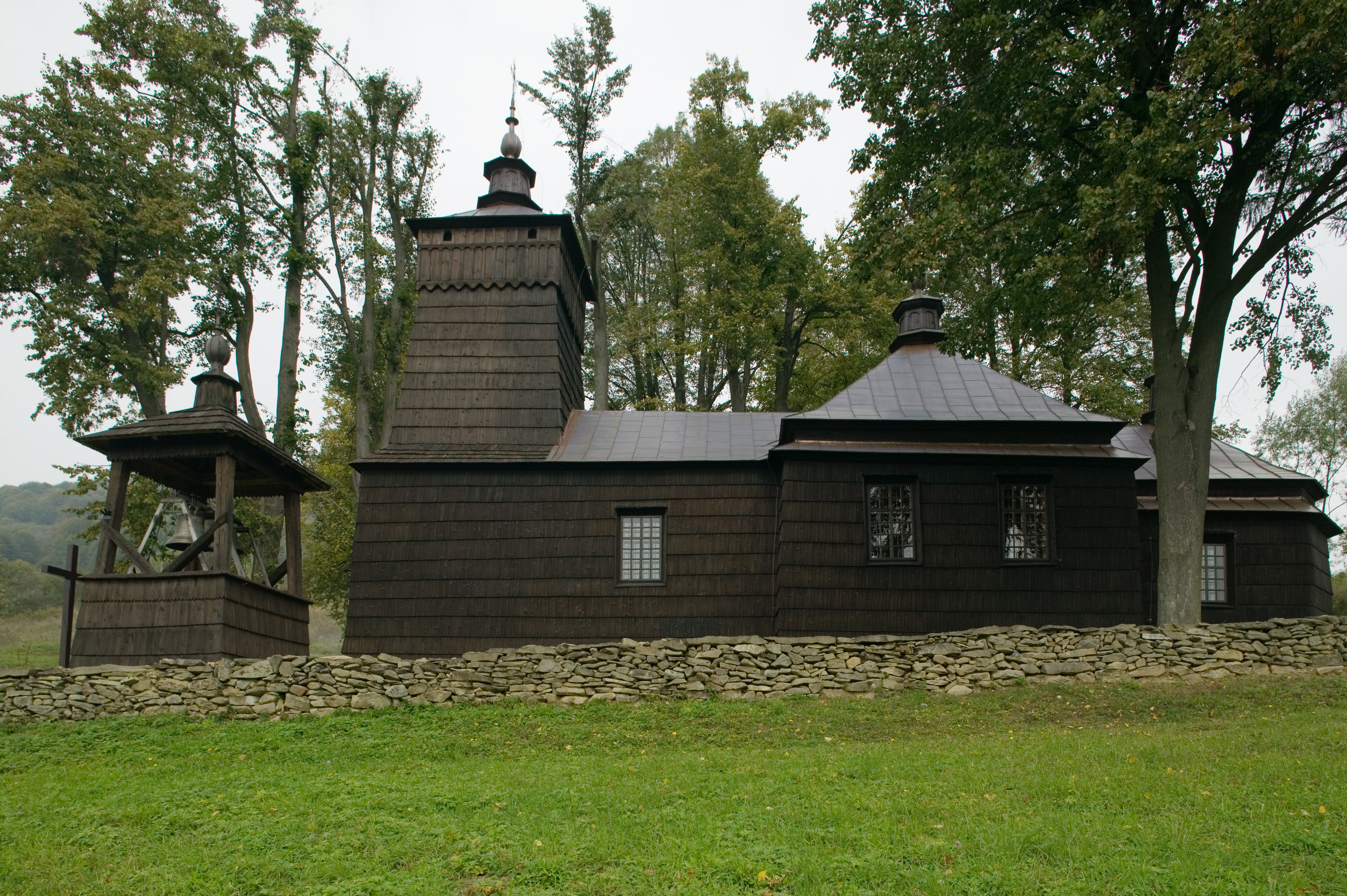 Leluchów, cerkiew greckokatolicka pw. św. Dymitra (obecnie kościół rzymskokatolicki)